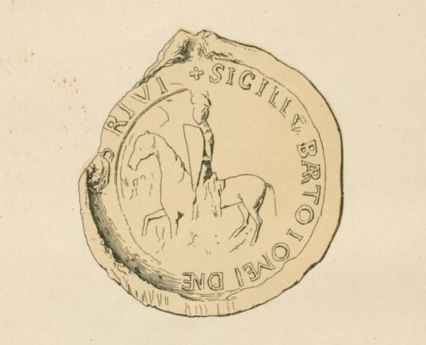 Sceau Barthélemy de Vignory, par Jules d'Arbaumont dans le Cartulaire du Prieuré de Saint-Etienne de Vignory (1882).